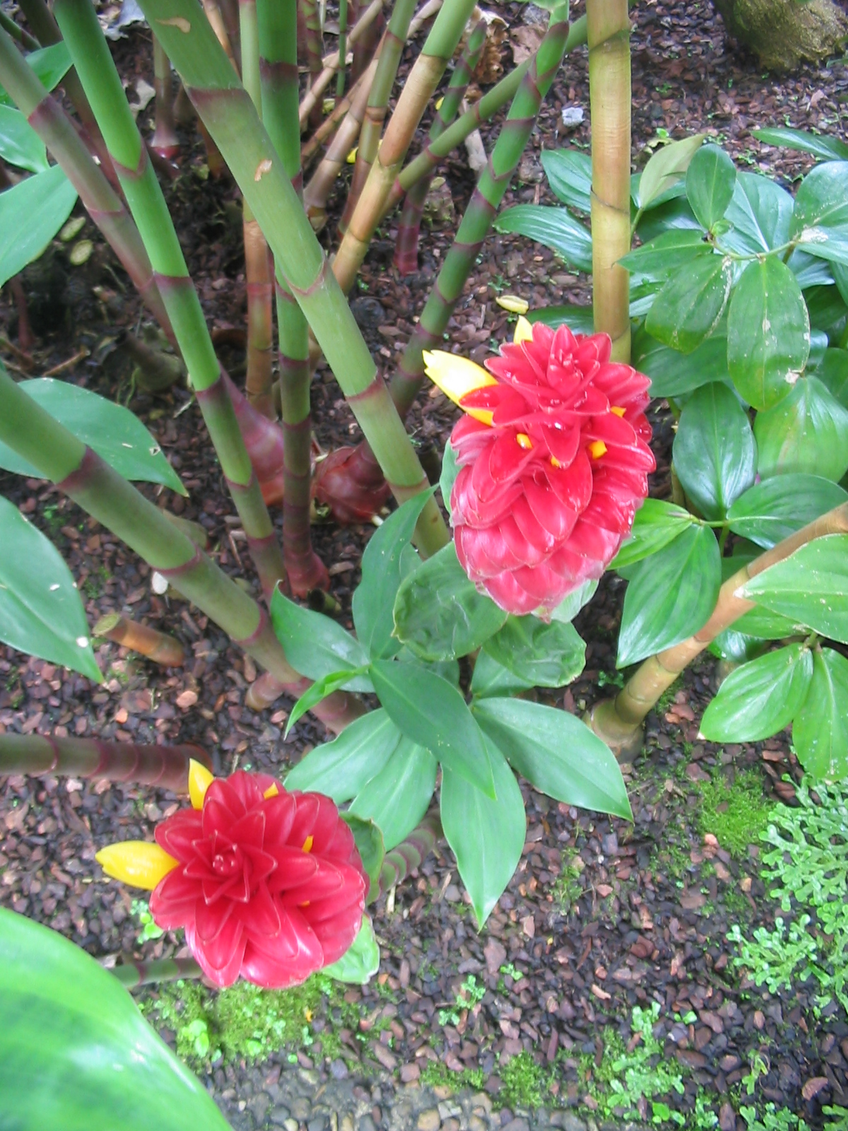 Costus tappenbeckianus - Blüte - Bot. Garten Edinburgh